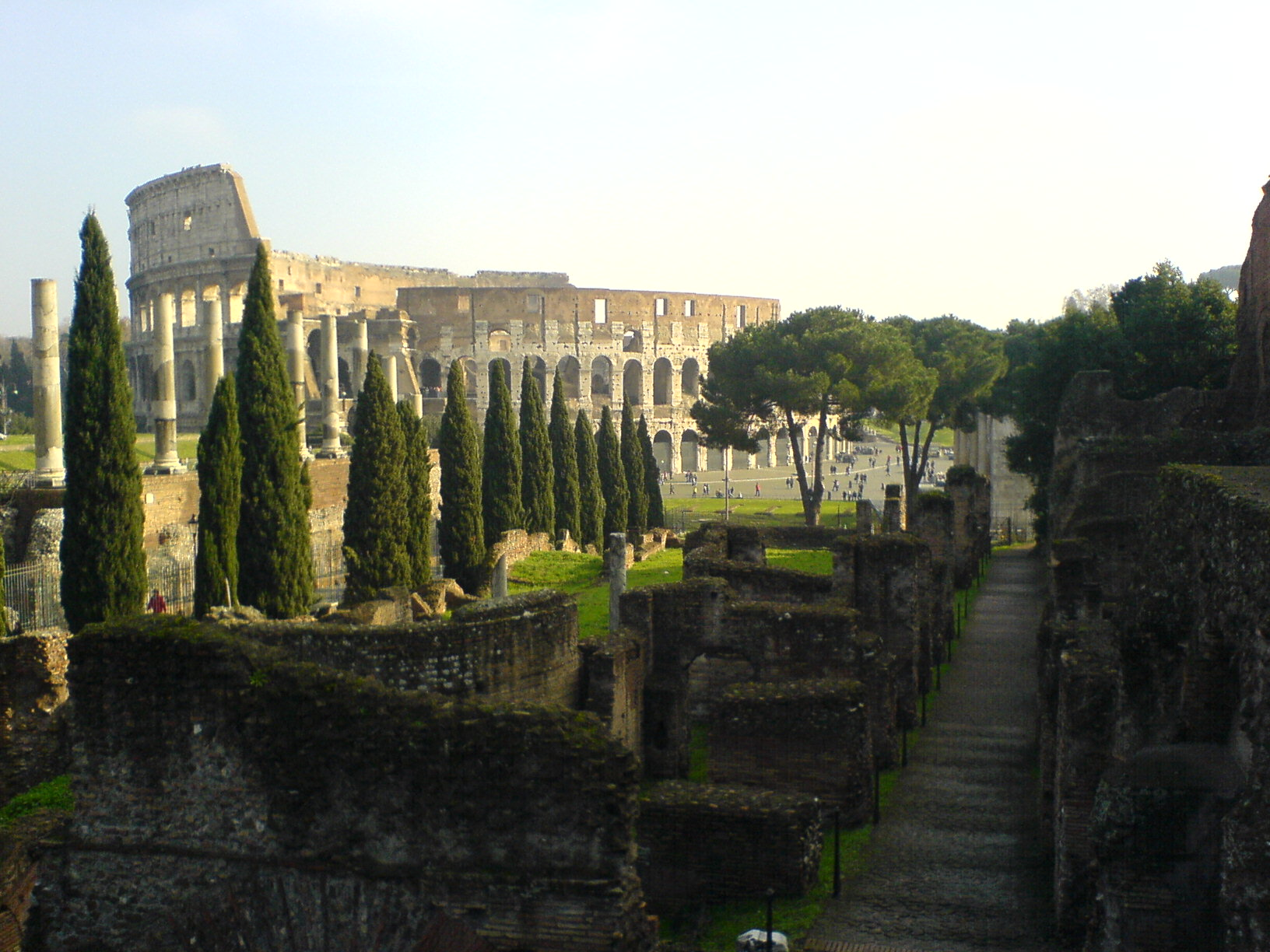 Colosseum gezien vanaf Palatino